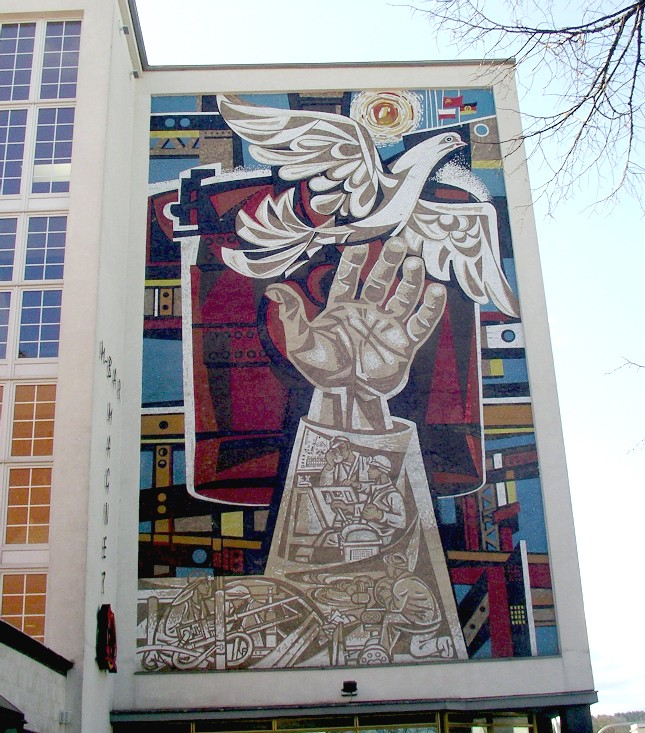 Natursteinmosaik am ehemaligen Textilkaufhaus (heute LindenCenter) Eisenhüttenstadt Titel: "Gemeinschaftsarbeit der sozialistischen Länder" Entwurf: Walter Womacka Fertigstellung: 1965 Maße: 16,00 x 10,00 m.